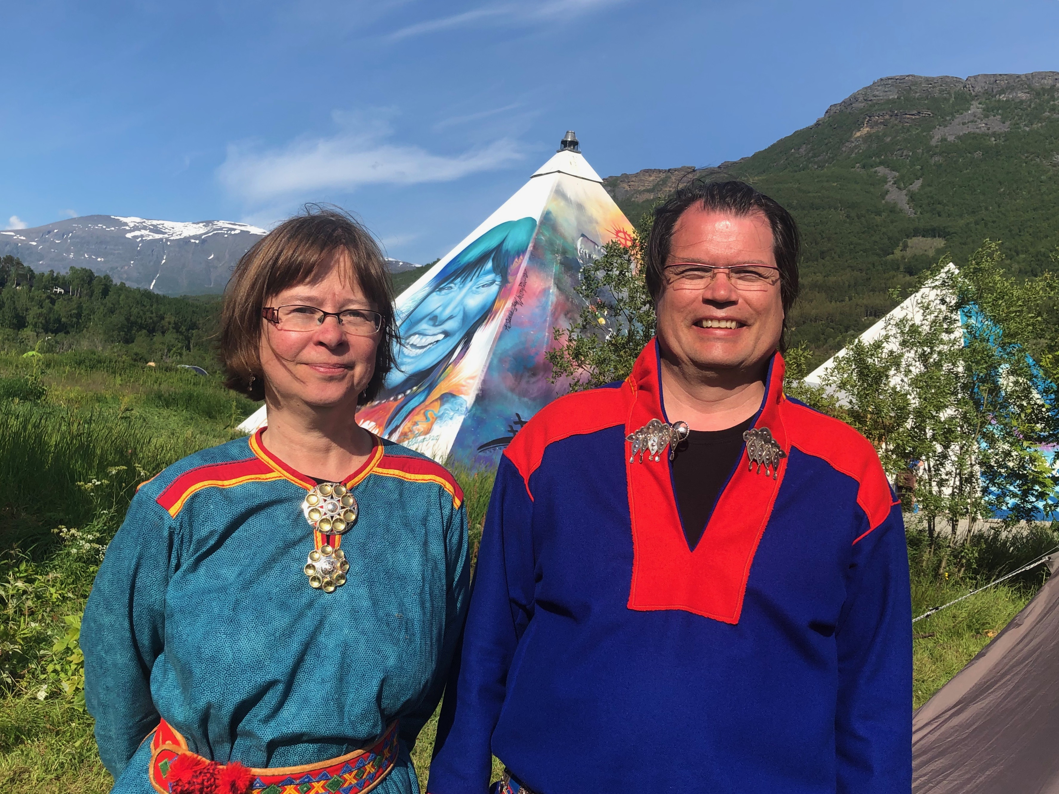 Staff from Divvun at University of Tromsø at Riddu Riđđu festival 2019